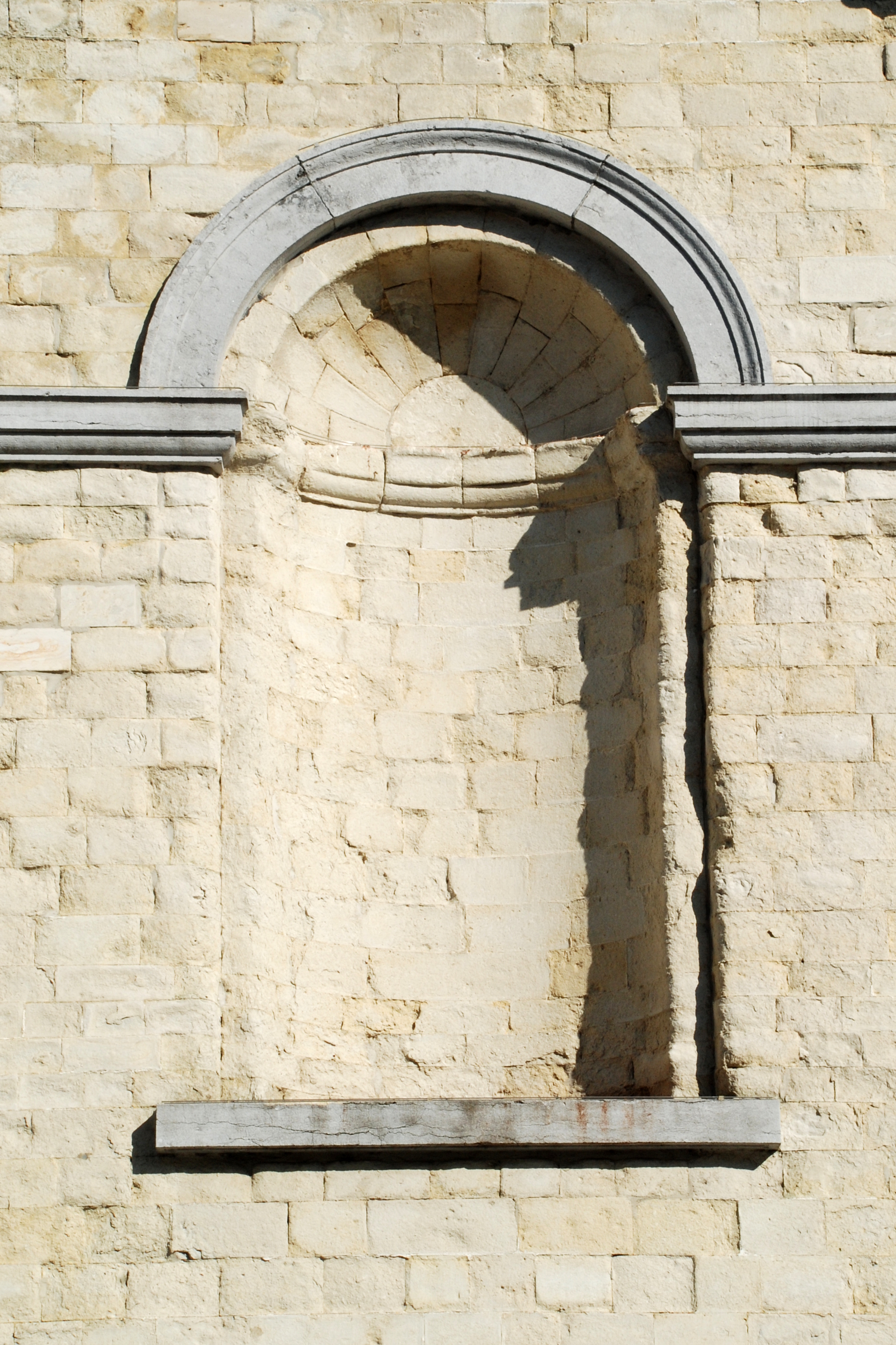 Belgique - Brabant wallon - Église Saint-Jean l'Évangéliste de Genappe